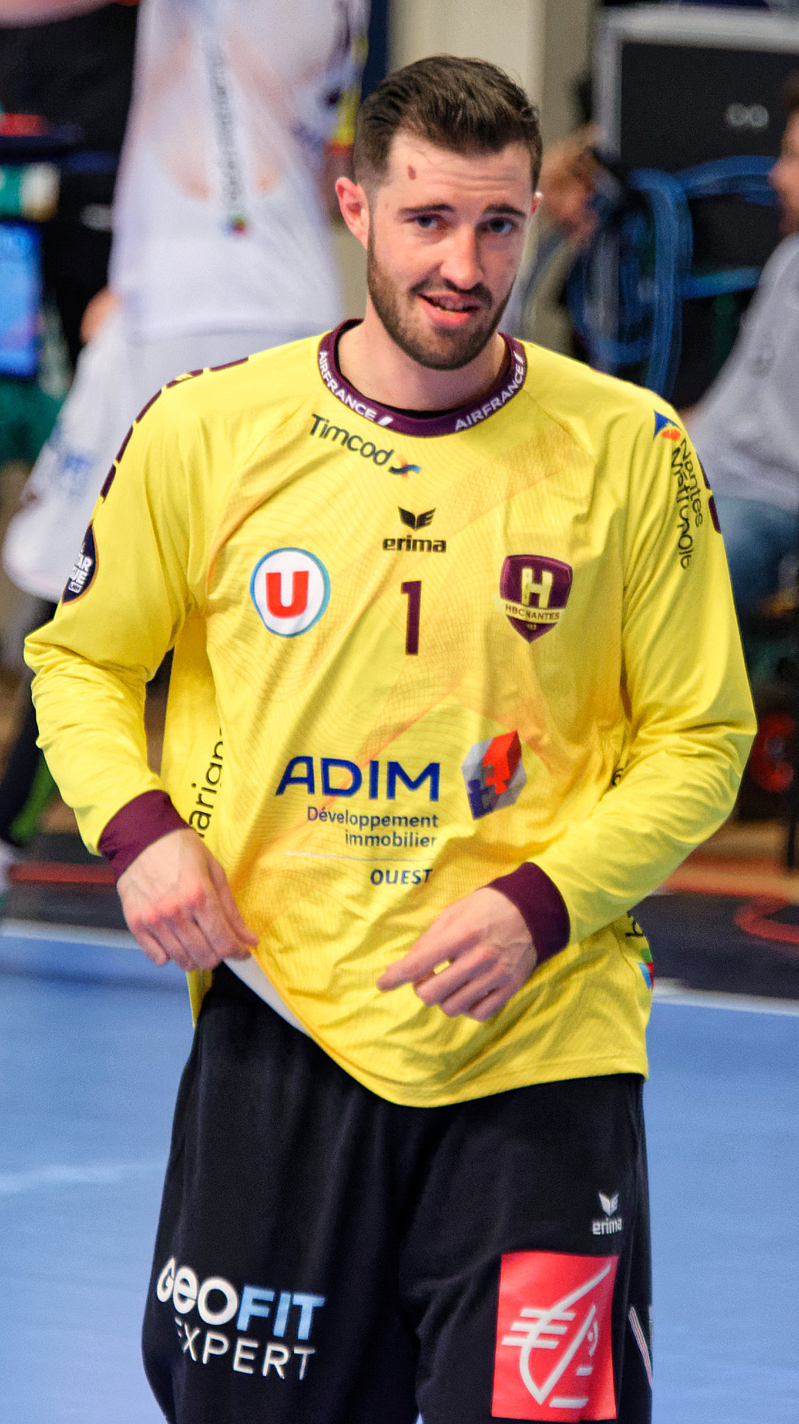 Rencontre de championnat entre le PSG et le HBC Nantes. A Coubertin, le 14 décembre 2018.